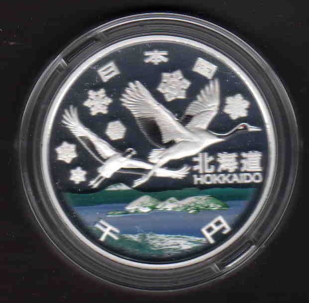 地方自治法施行60周記念貨幣の1000円記念銀貨のうち、北海道の洞爺湖上空を飛行するタンチョウツルのデザイン